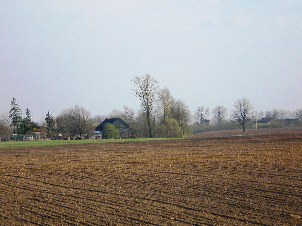 Kėdainių seniūnija. Bartkūniškių kaimo apylinkės Foto: Hugo.arg 2007.04.17